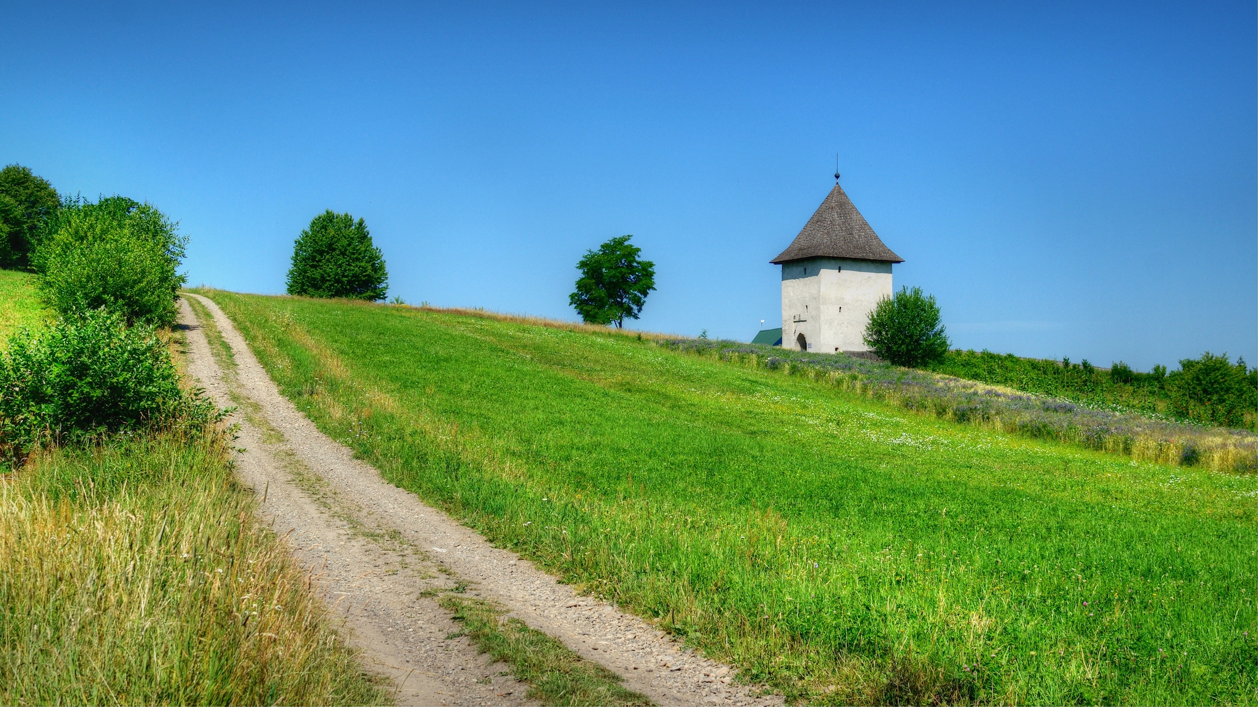 Підїздна дорога